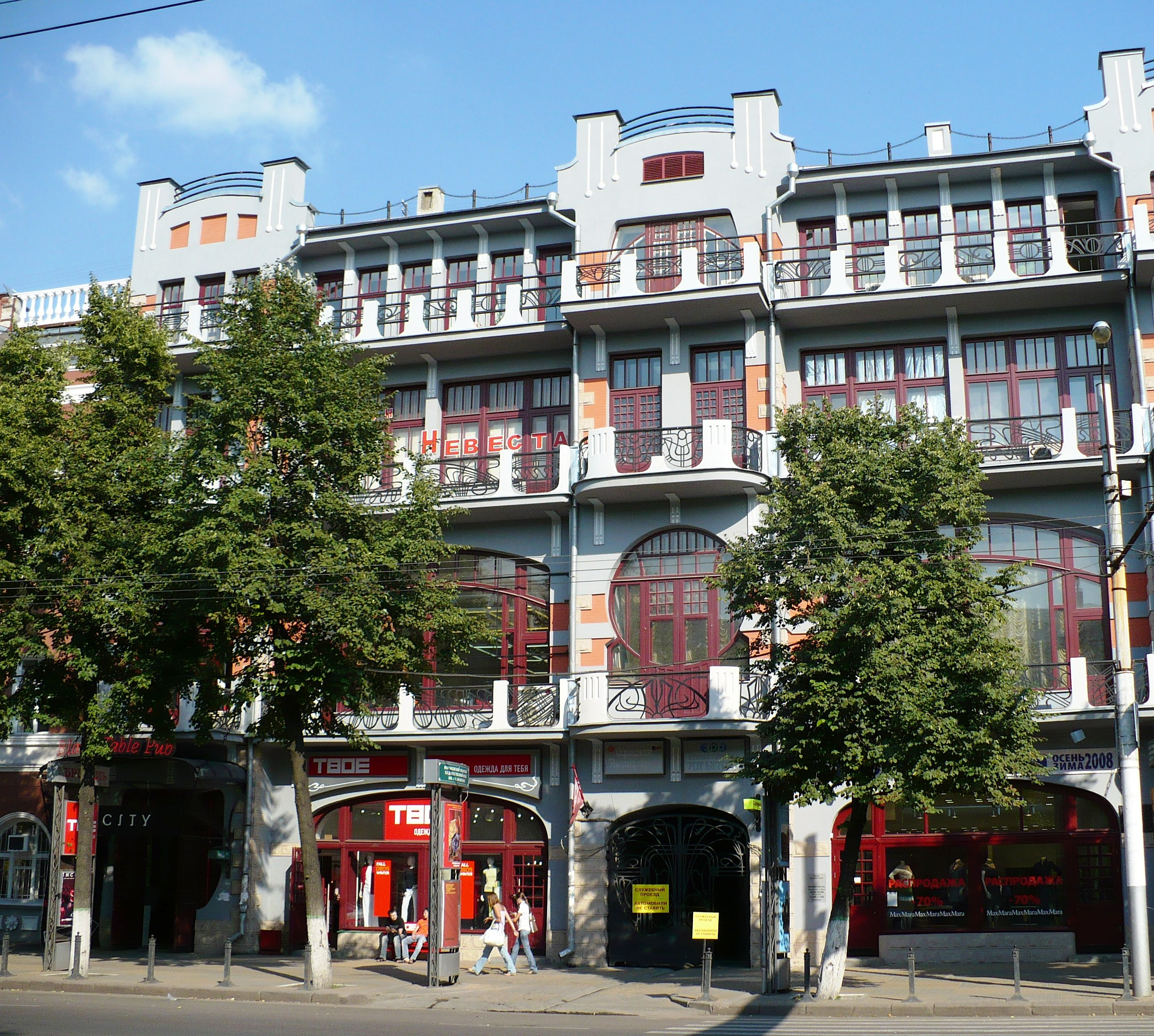 Здание бывшей гостиницы "Бристоль" в Воронеже